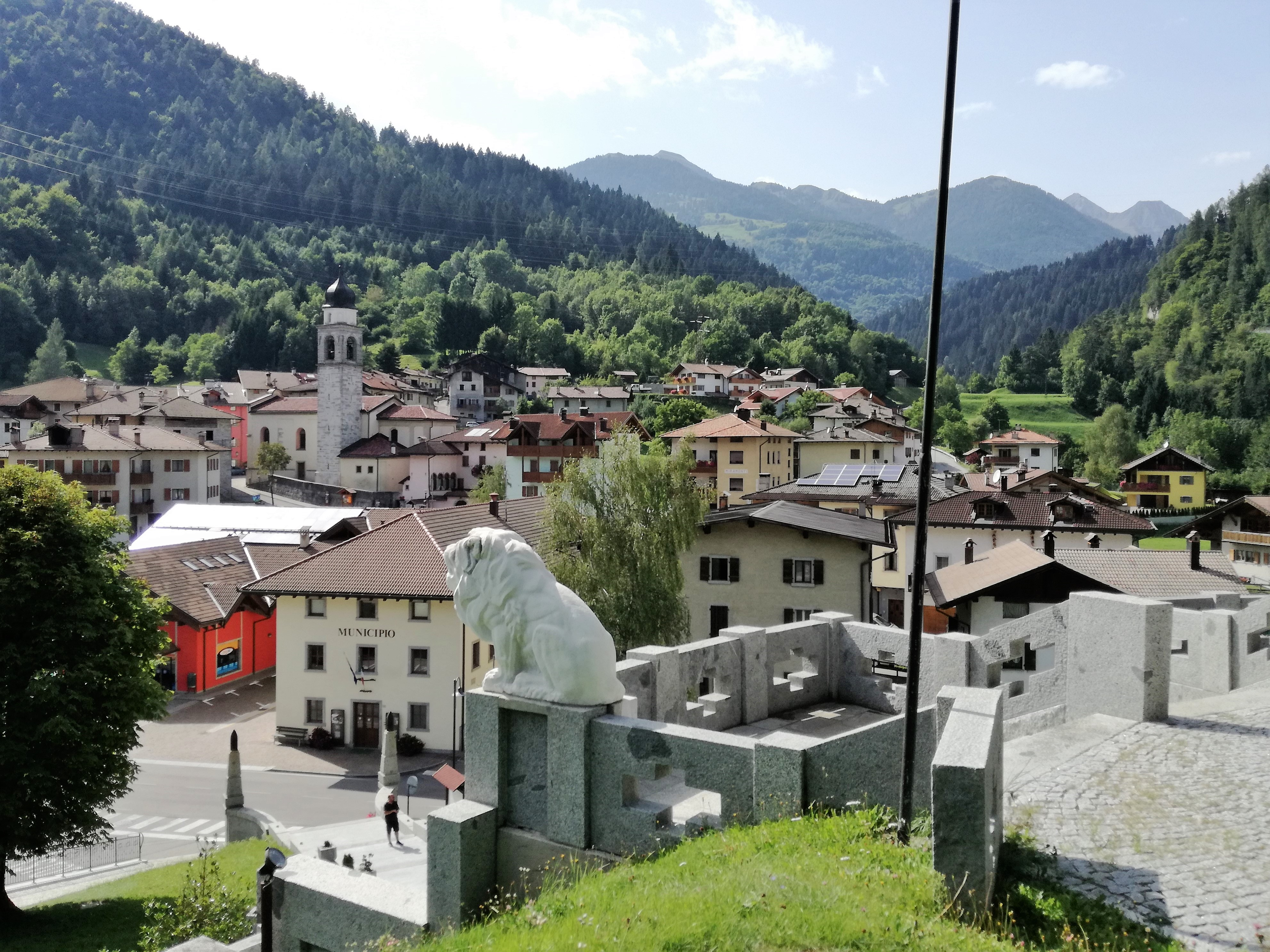 Bondo - Sella Giudicarie -Trentino